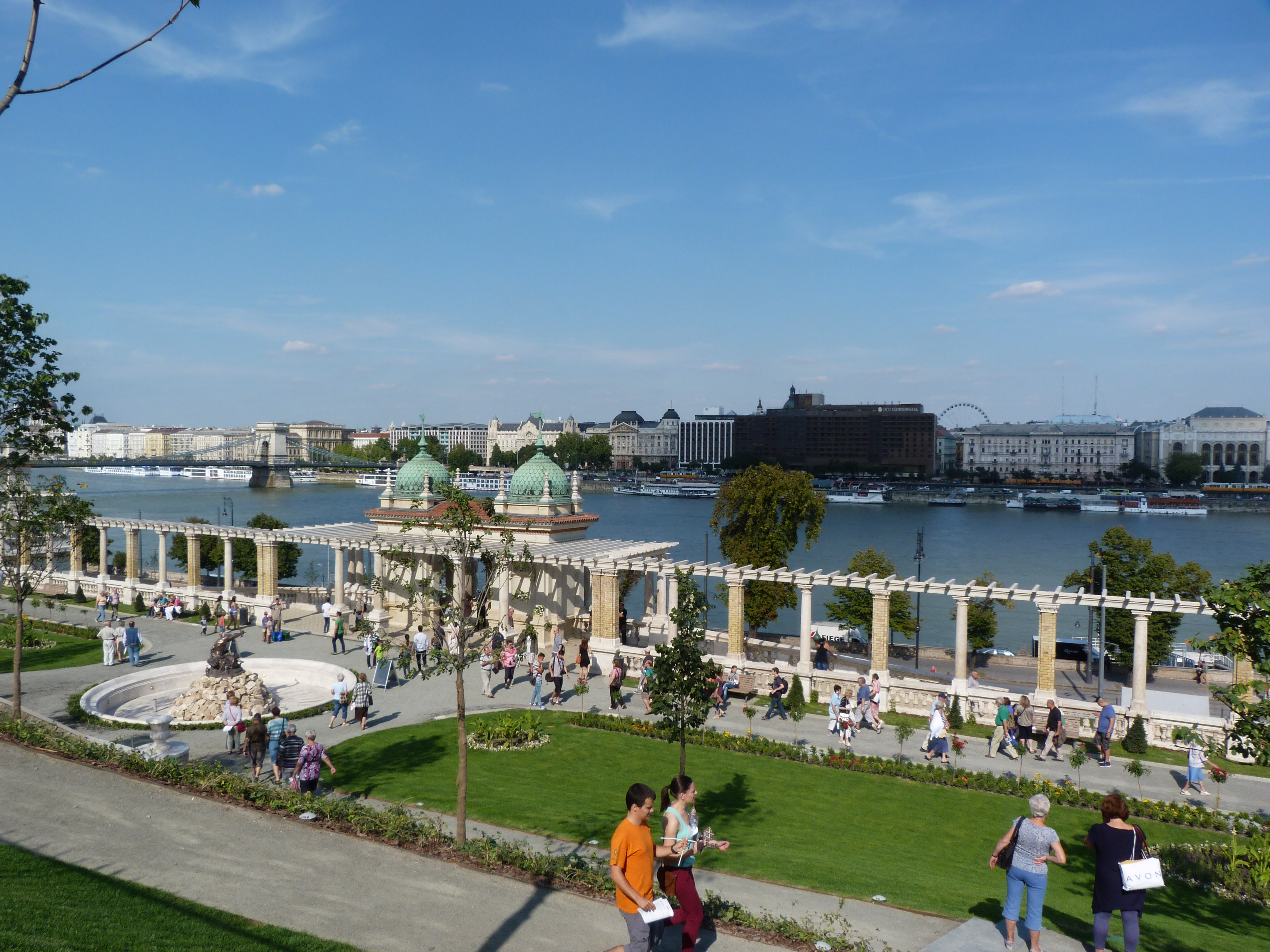 A felvétel 2014. augusztus 29-én készült Budapesten, a Várkert Bazárban. A Lánchíd utca felújítása elkészült, amit utcabállal ünnepelt a főváros. A Petőfi teret hajójárat kötötte össze az újonnan nyitott Várkert kikötővel, a Lánchíd utcát a gépkocsi forgalom elől 2014. szeptember 15-ig lezárták. ©© Derzsi Elekes Andor, Budapest 2014, You are authorised to use these photos and vids under Creative Commons – even for commercial, for profit purposes. Photos must be attributed to Derzsi Elekes Andor. All of the photos and vids in the Metapolisz DVD line are under Creative Commons and can be used even for commercial – for profit – purposes. Recommended Citation Derzsi Elekes Andor: Metapolisz DVD line